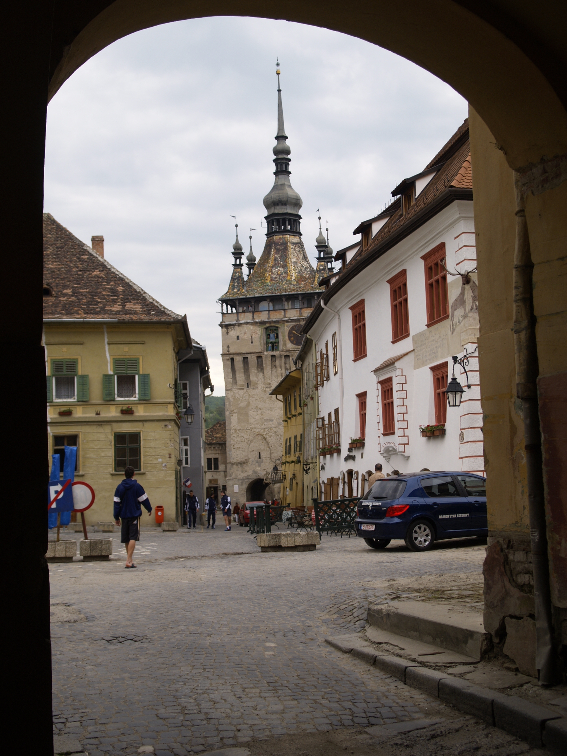 Schässburg, Siebenbürgen, Romania